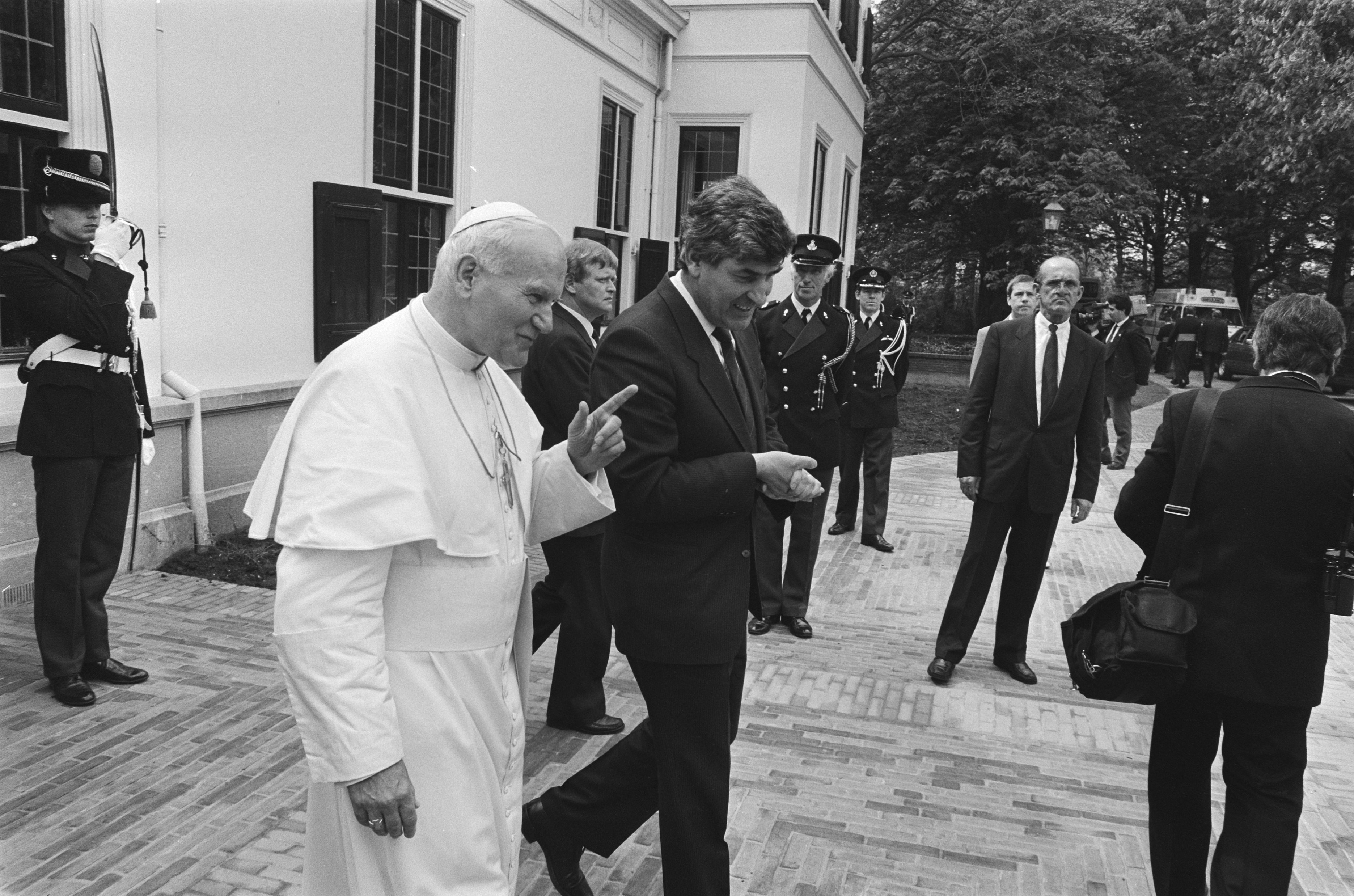 Collectie / Archief : Fotocollectie Anefo Reportage / Serie : [ onbekend ] Beschrijving : Bezoek Paus Johannes Paulus II aan Nederland; Paus en premier Lubbers bij Catshuis Datum : 13 mei 1985 Trefwoorden : bezoeken, pausen Persoonsnaam : Johannes Paulus II (paus), Lubbers, Ruud Fotograaf : Croes, Rob C. / Anefo Auteursrechthebbende : Nationaal Archief Materiaalsoort : Negatief (zwart/wit) Nummer archiefinventaris : bekijk toegang 2.24.01.05 Bestanddeelnummer : 933-3278